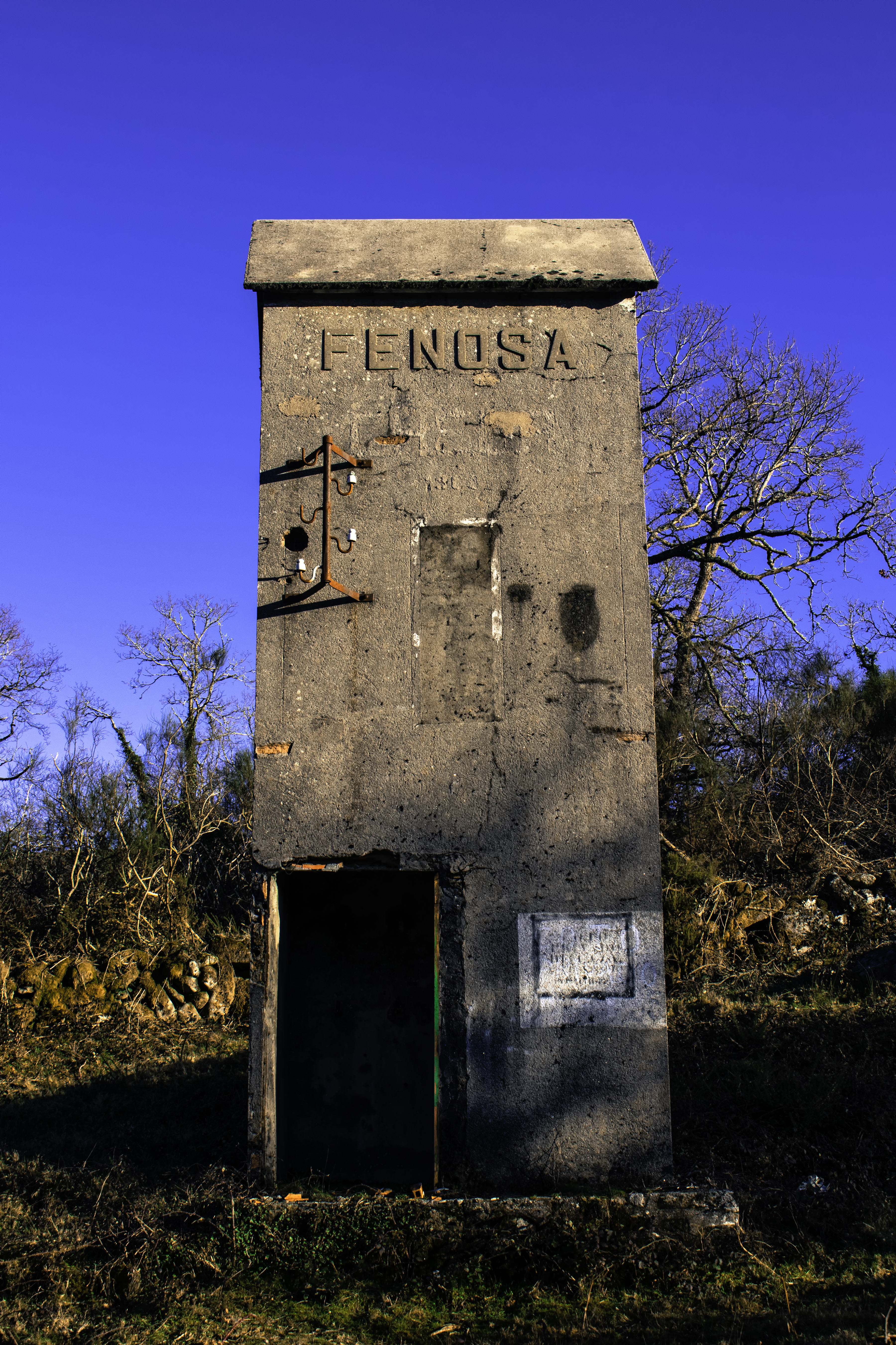 Transformador no Eido do Macho, A Lama.